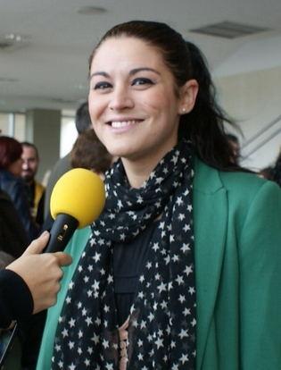 La diputada de Compromís a les Corts Valencianes, Mireia Mollà